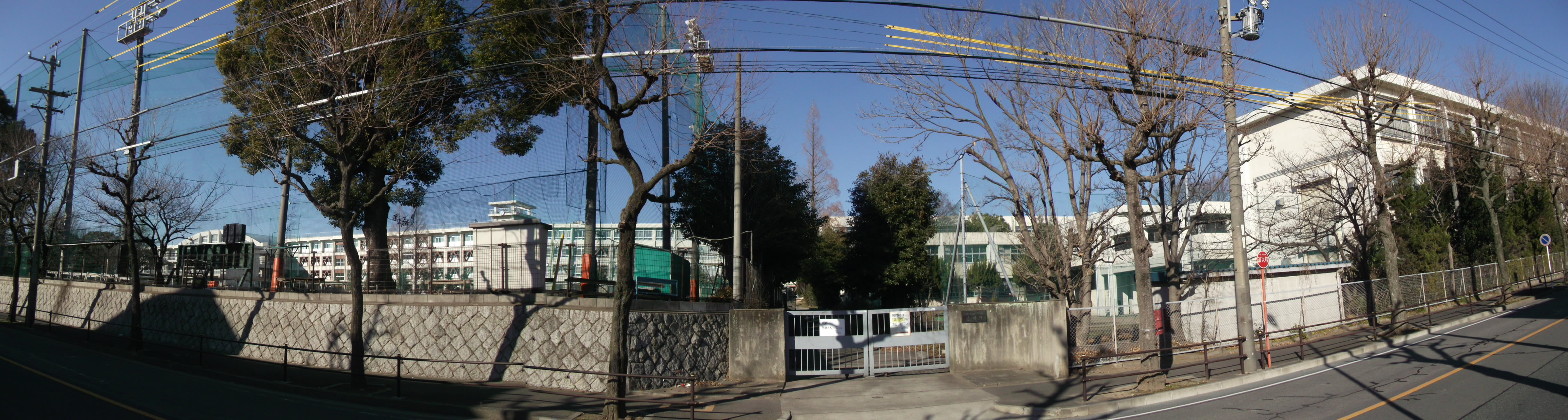 名古屋市東区の名古屋市立工芸高等学校を南側公道より撮影。現地においてカメラのパノラマ合成機能により3枚分の画像を合成。